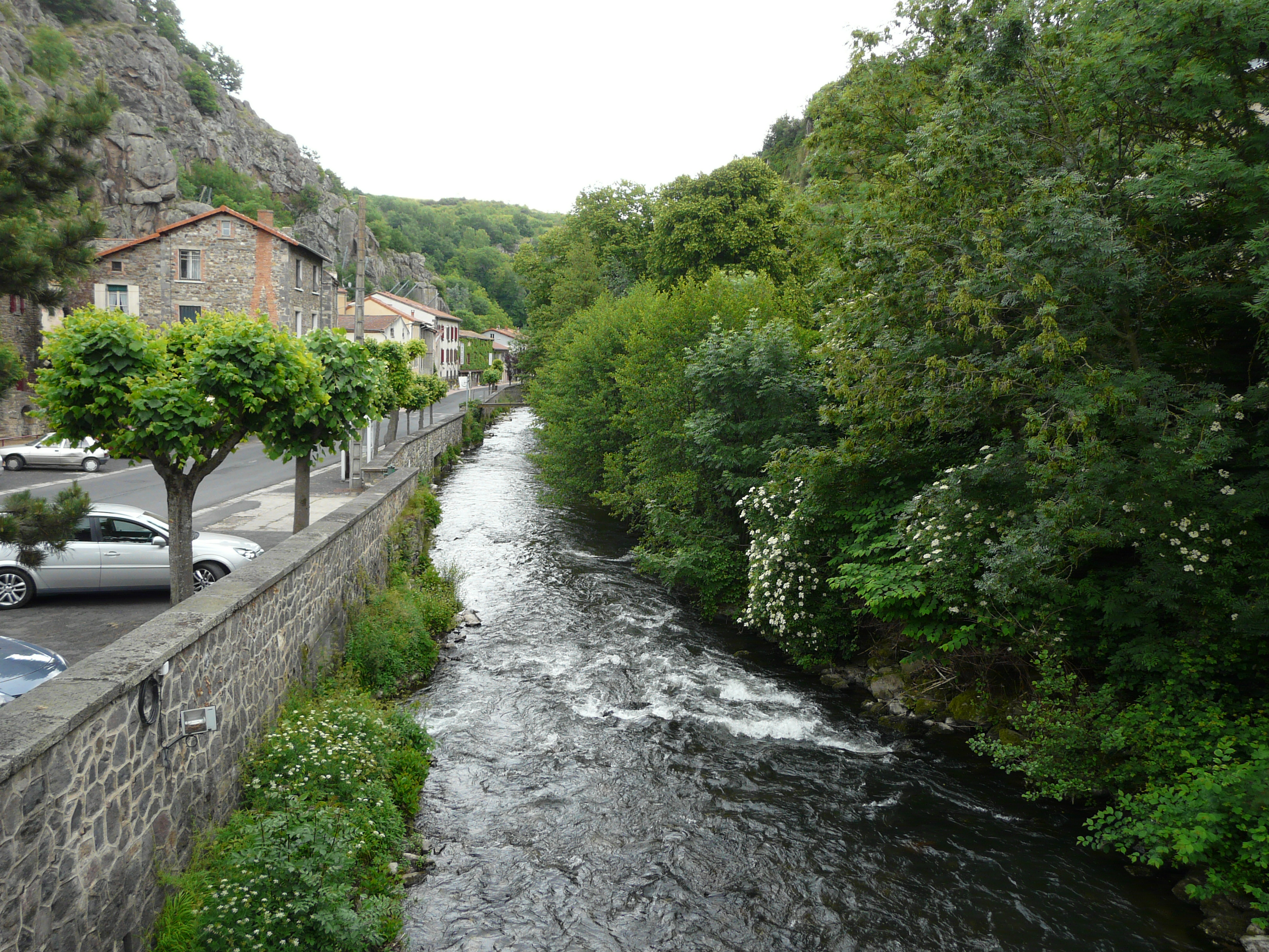 La Couze Pavin en aval du vieux pont, Saint-Floret, Puy-de-Dôme, France.